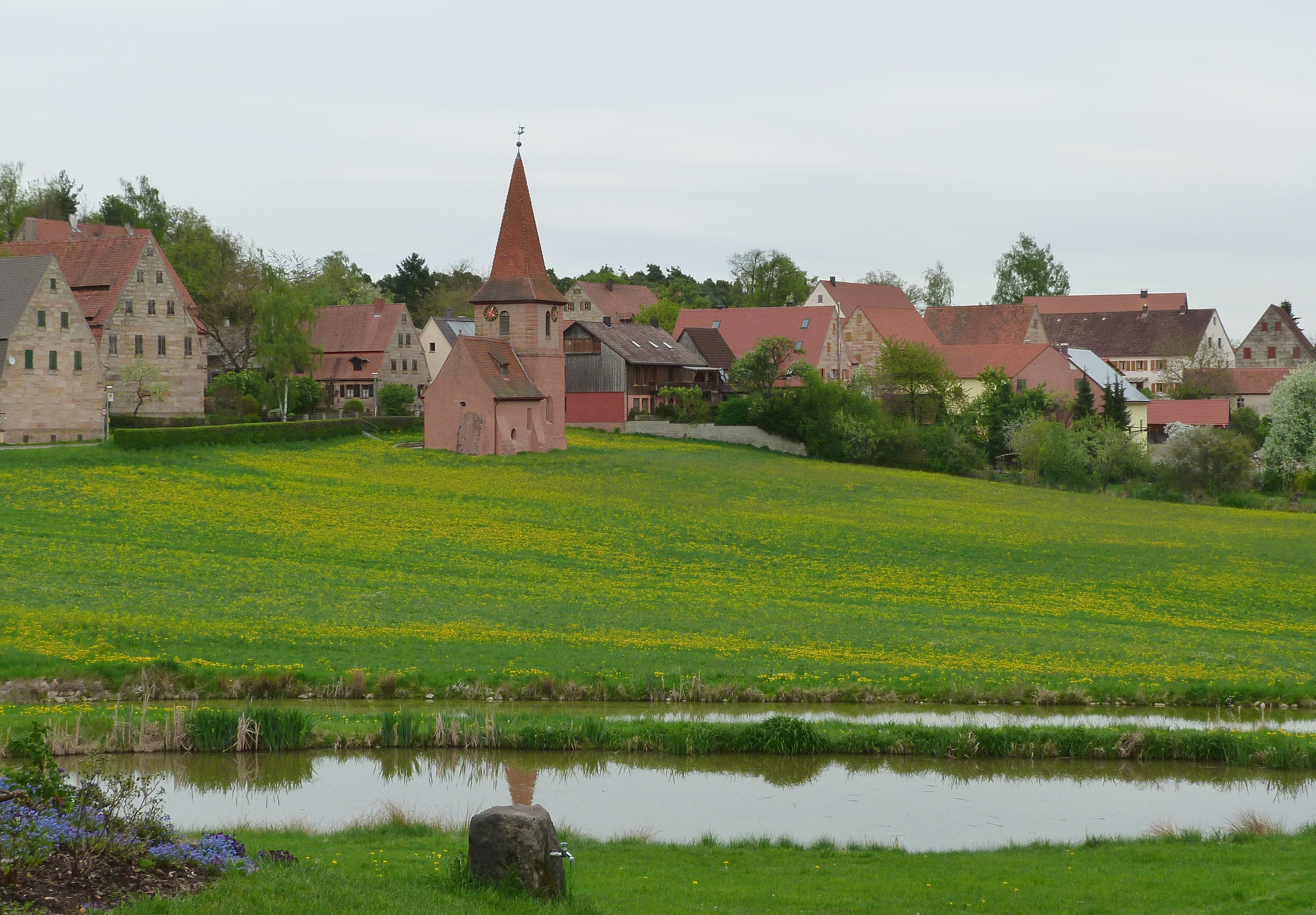 Kirche St. Oswald in Mäbenberg